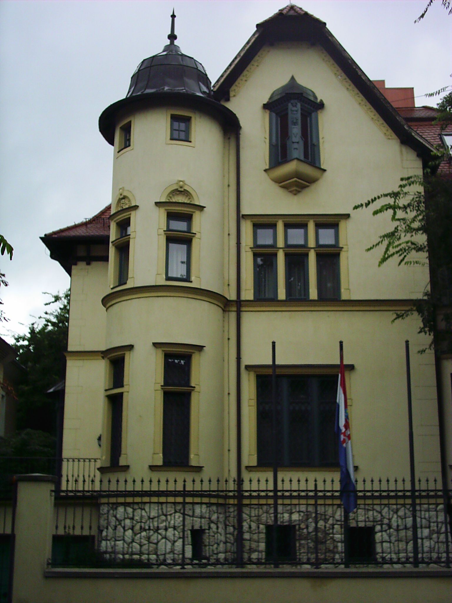 Horvát nagykövetség, Budapest, Munkácsy utca